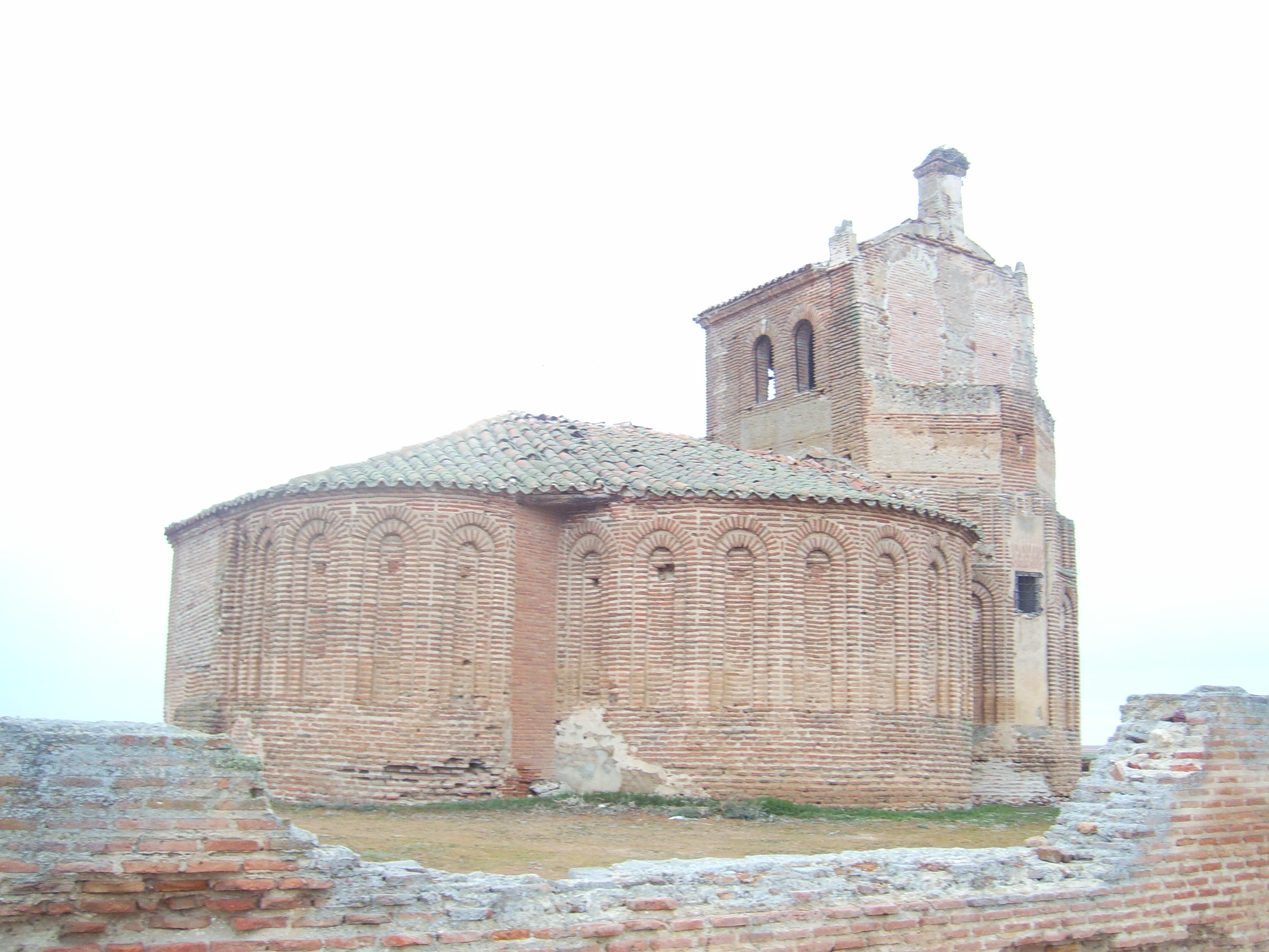 Iglesia Villar de Matacabras (Madrigal,Ávila)